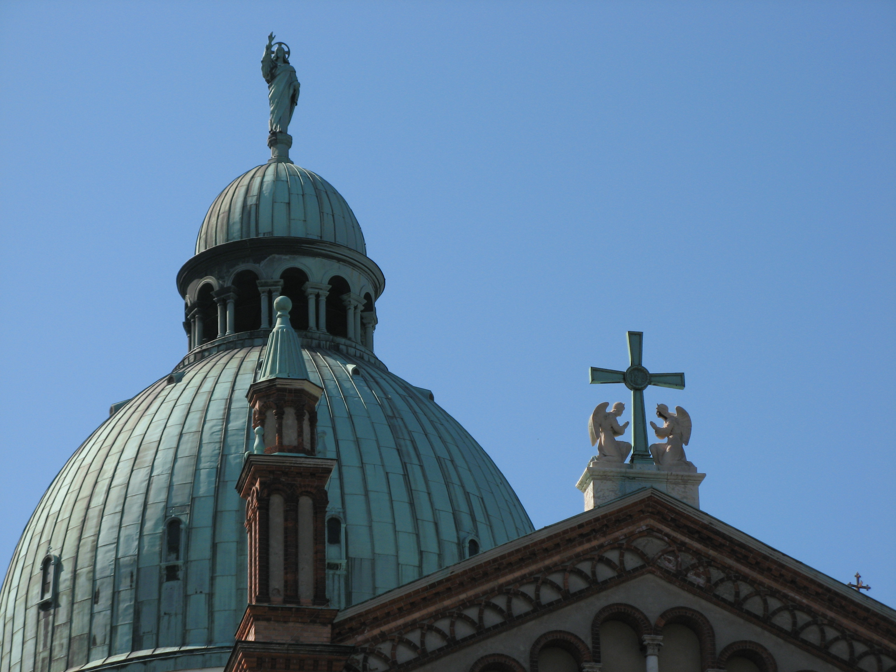 Antonskirche, Antonsplatz, Wien-Favoriten